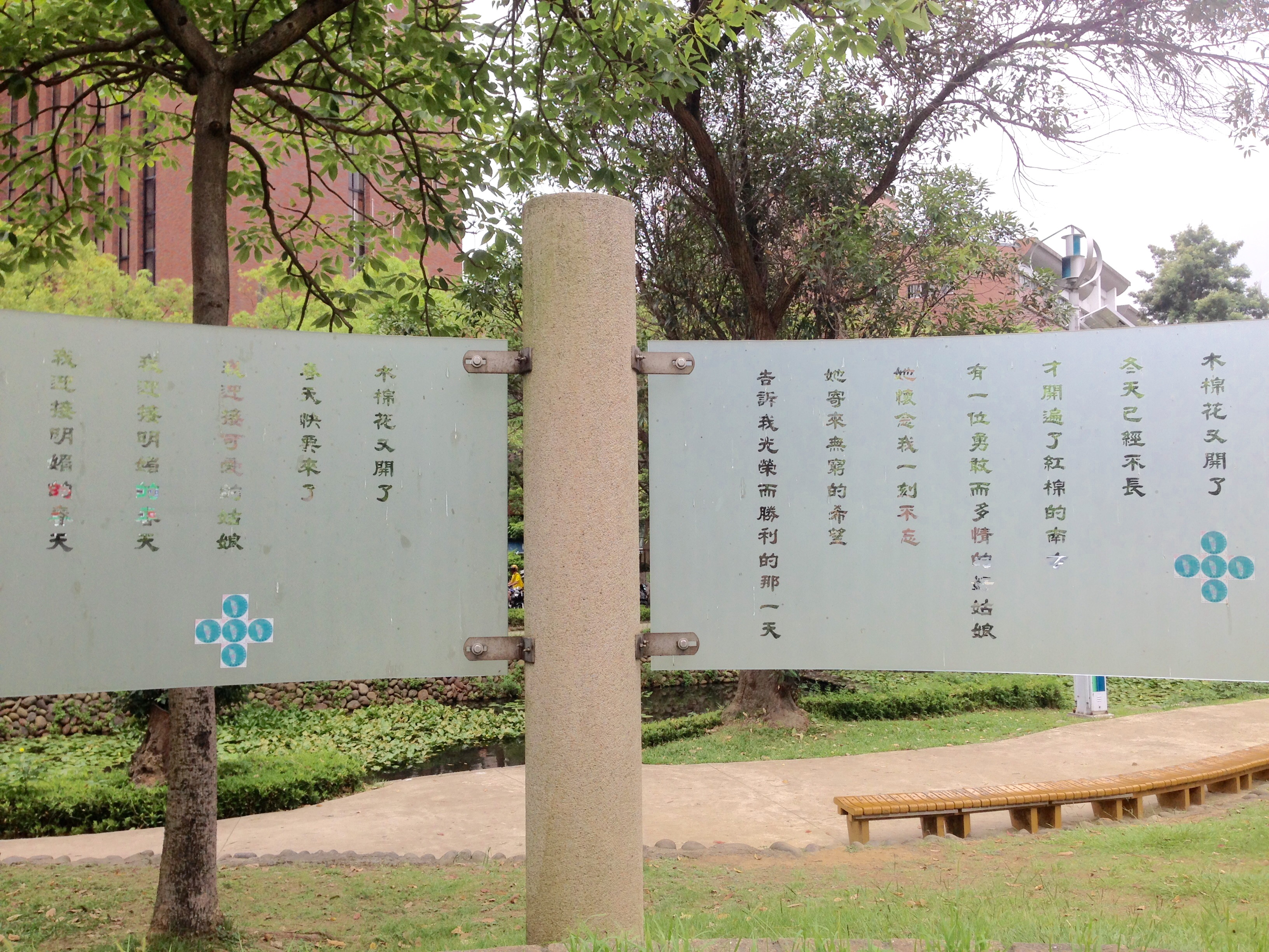 中文（台灣）: 新竹二二八紀念碑的木棉花之歌